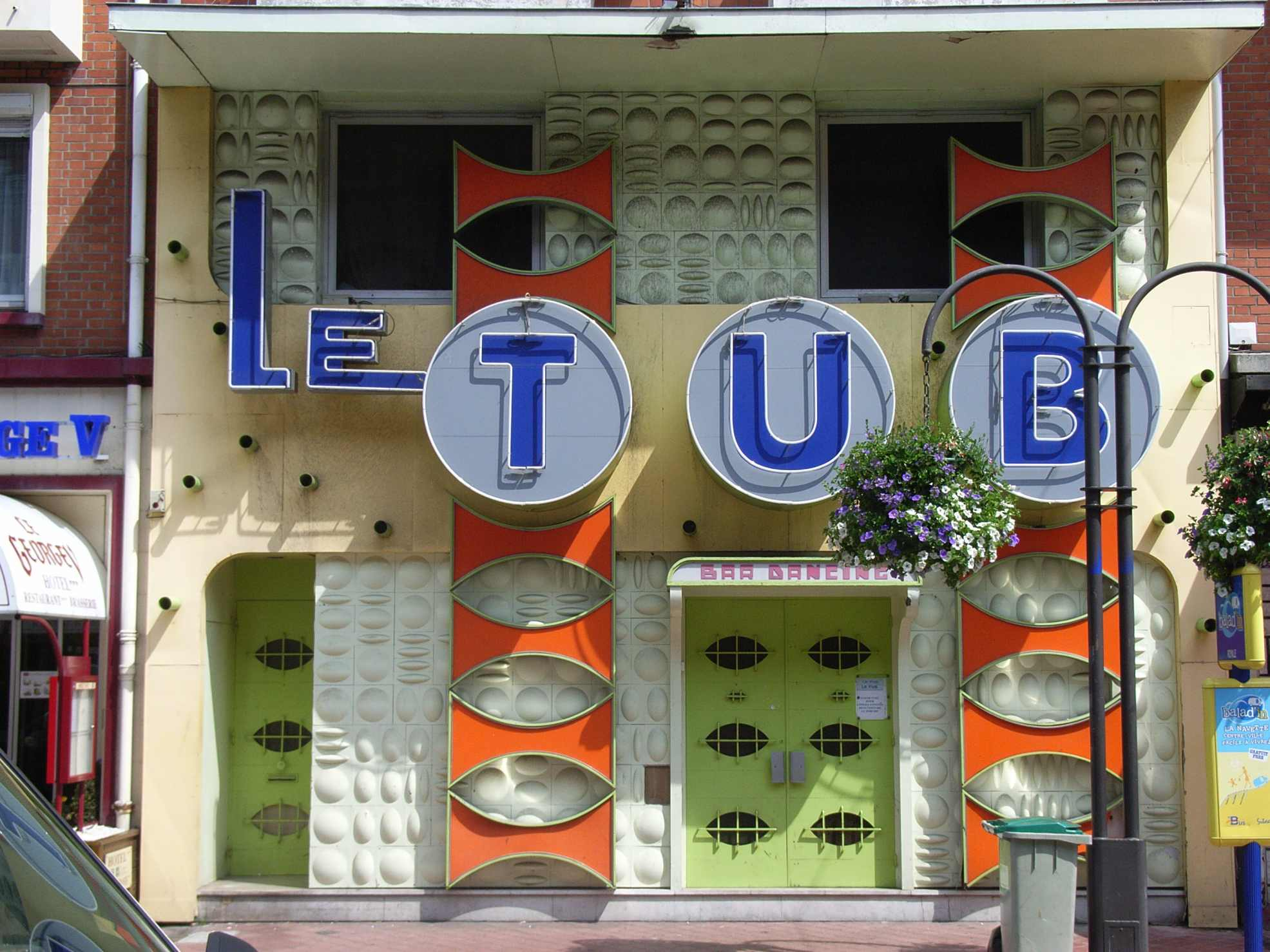 Fassade der Dikothek Le Tub, Calais